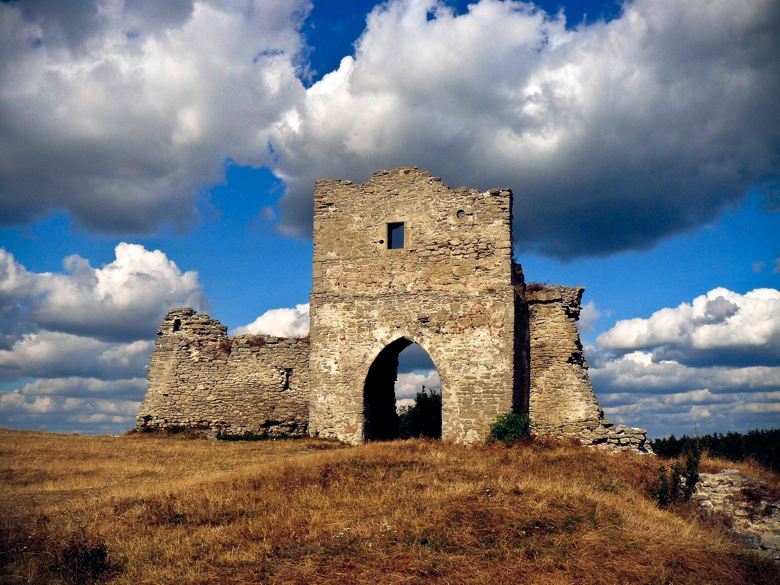 Замок (руїни), Кременець, вул. Замкова